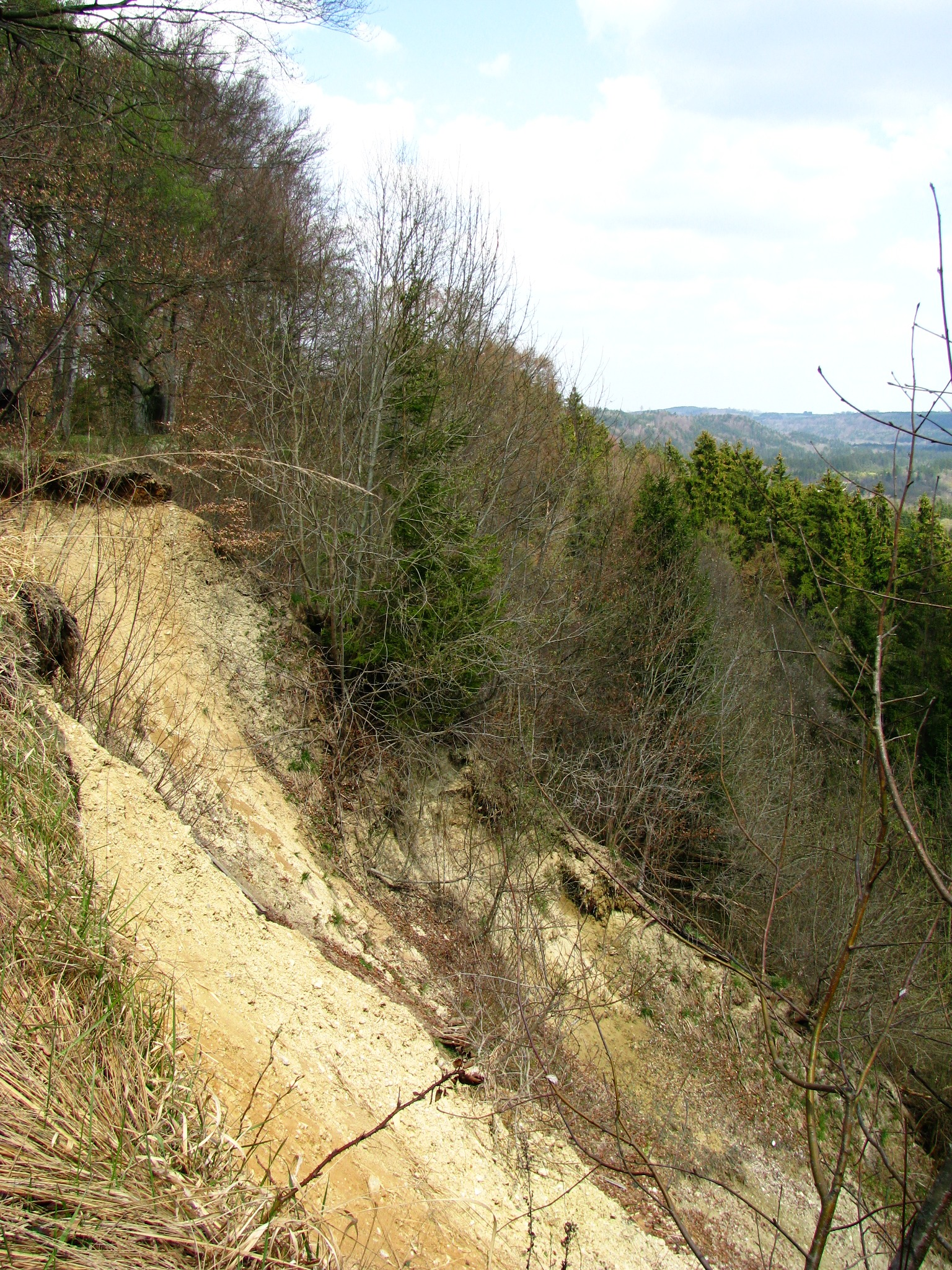 „Weiße Wand“, linkes Isarsteilufer bei Icking